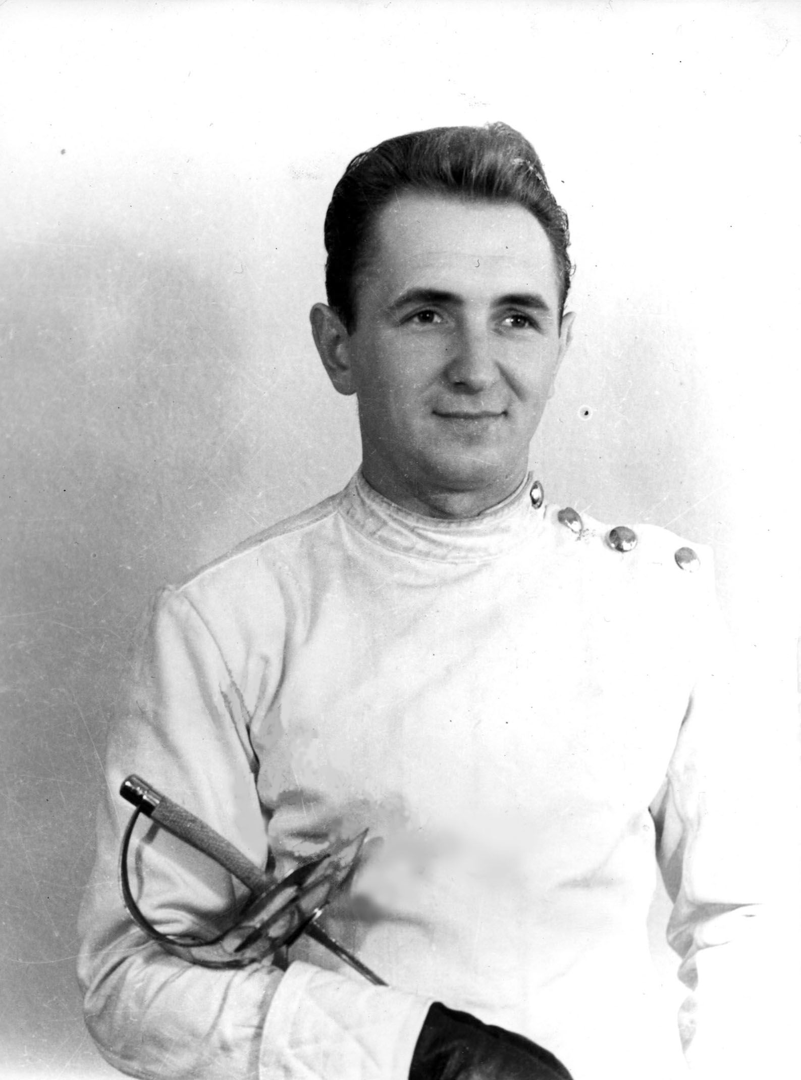 Jerzy Pawłowski, 1968 Olympics